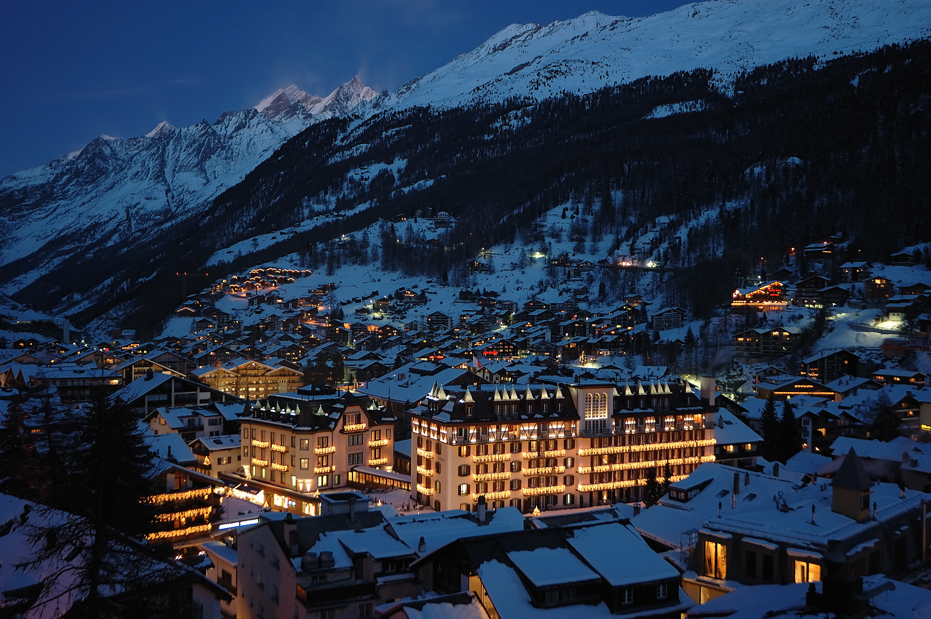 Mont Cervin Palace im Abendlicht in Zermatt